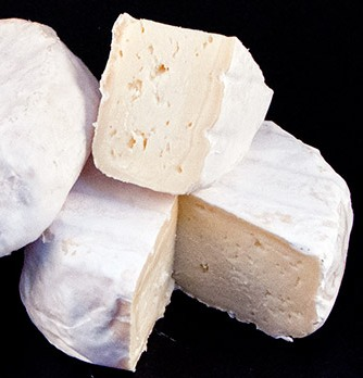 Queso Cueva de Llonín